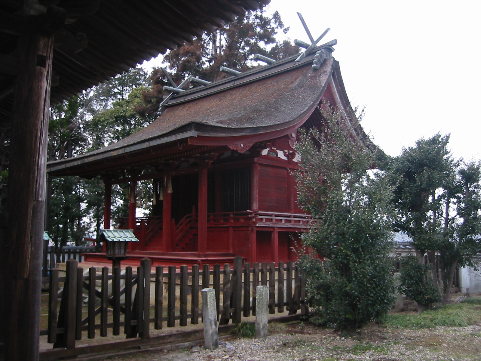 浄土寺 (小野市)